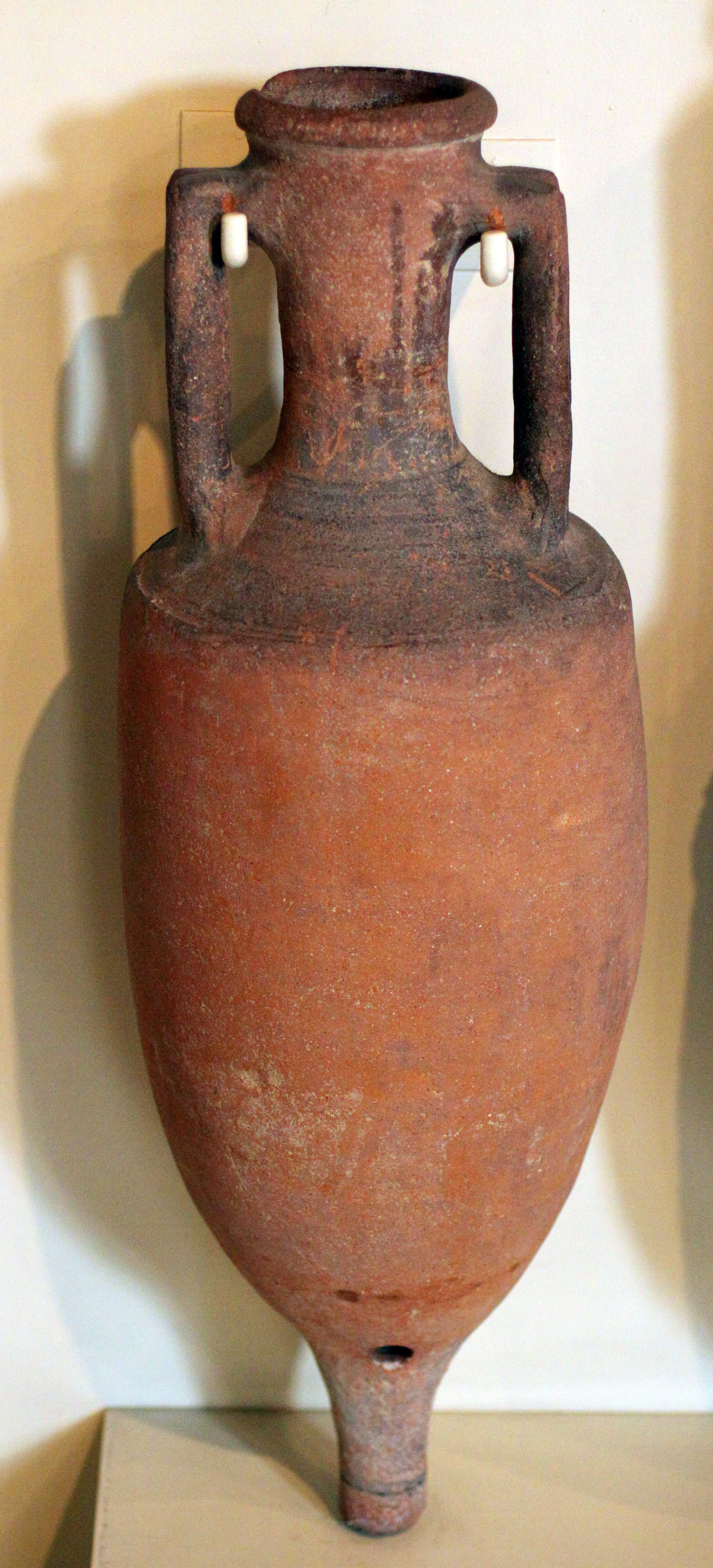 Amphore à vin, 1er siècle après JC, Terre cuite 92x29 cm - Vienne en Isère